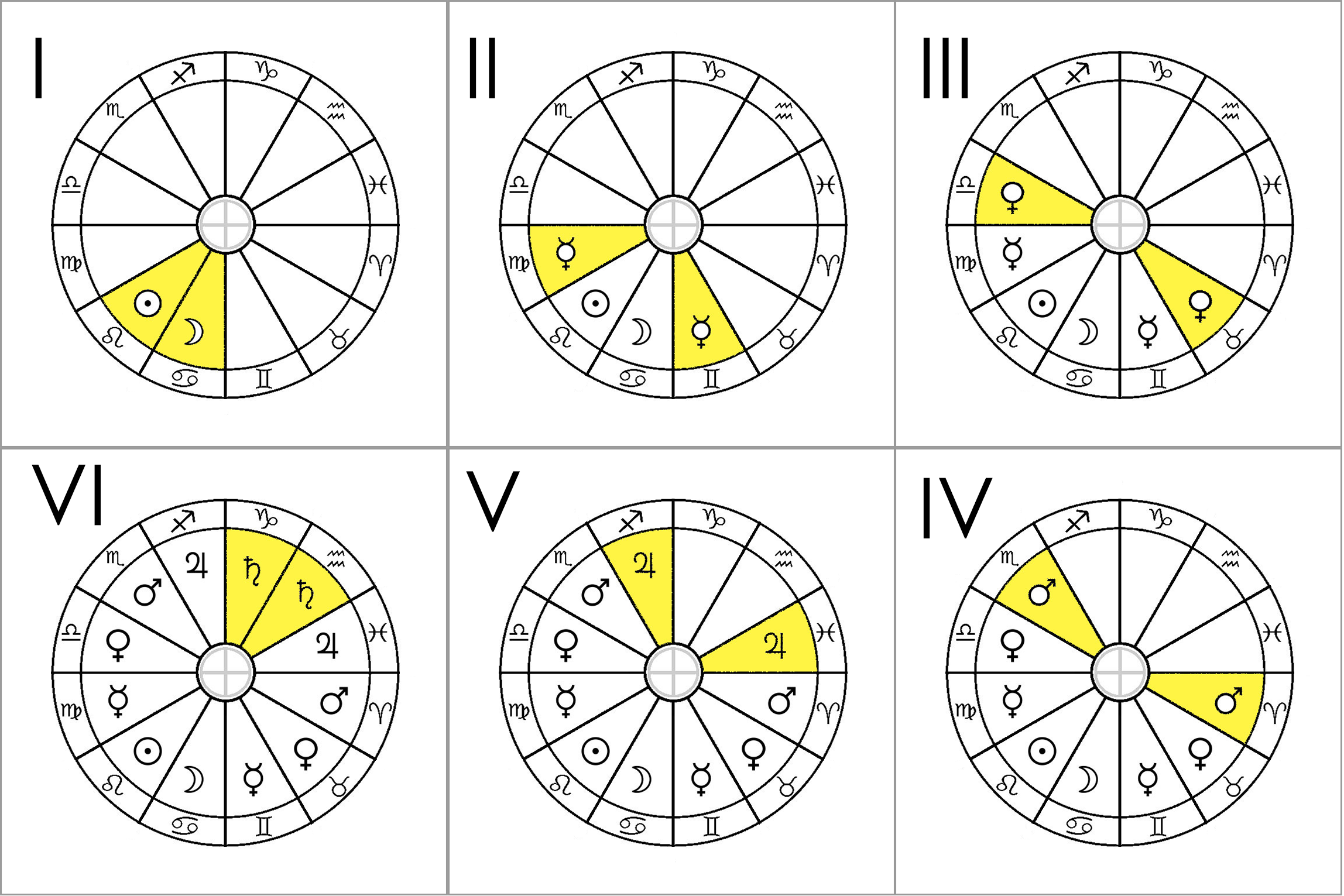 Размещение домов (домицилей) планет по знакам Зодиака в "Тетрабиблосе" Клавдия Птолемея. Сделано на основе Клавдий Птолемей. Математический трактат, или Четверокнижие (первые две книги) // Знание за пределами науки: Мистицизм, герметизм, астрология, алхимия, магия в интеллект. традициях I—XIV вв. / Сост. и общ. ред. И. Т. Касавина. — М.: Республика, 1996. — С. 106. — 445 с. — 5 000 экз. — ISBN 5-250-02588-9.